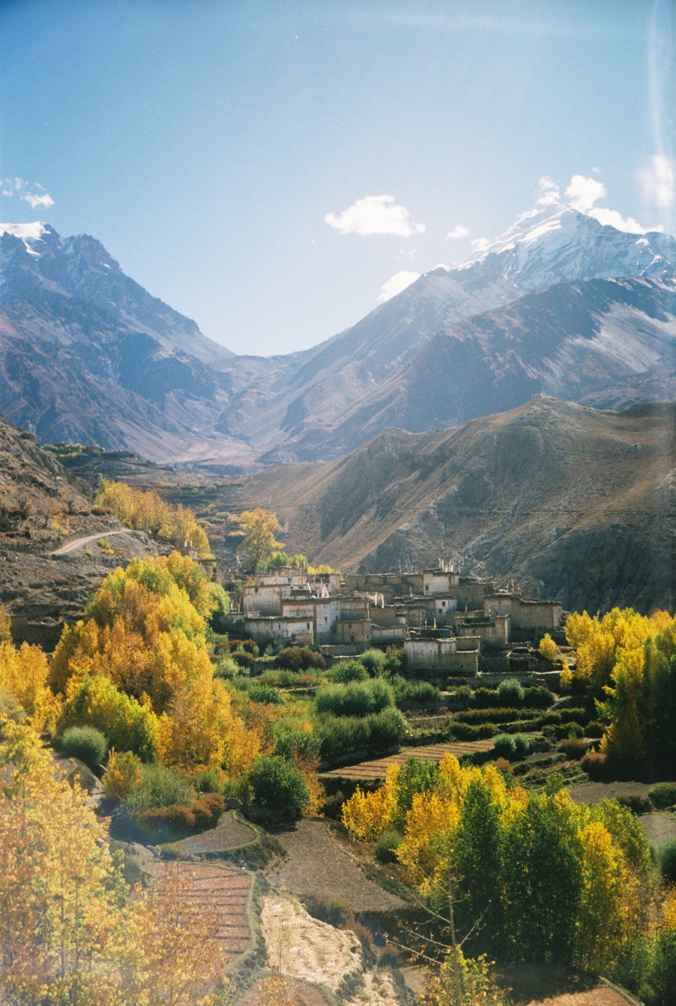 Jhong in Nepal